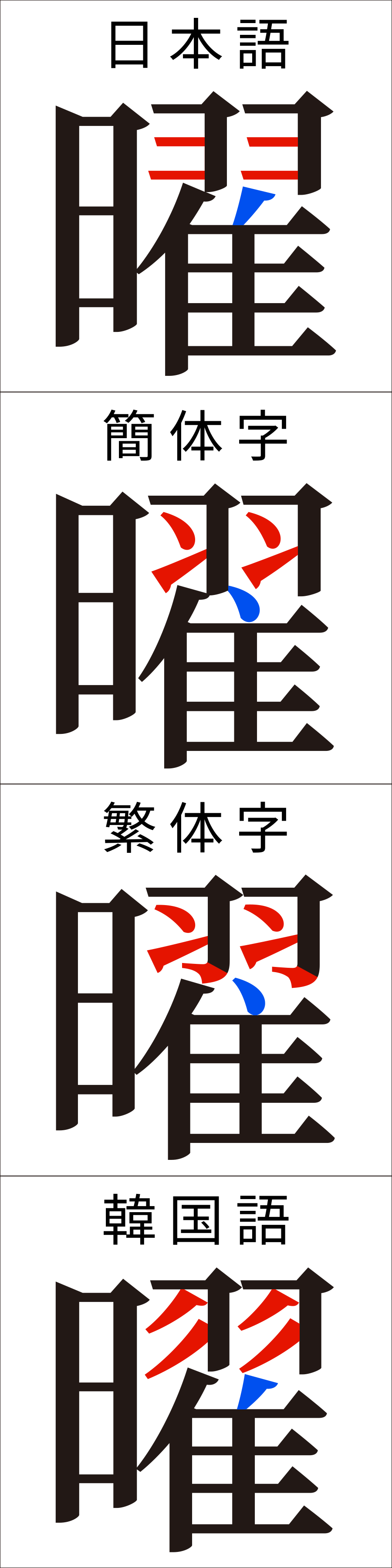 Source Han Serif（源ノ明朝）の言語別バリエーション例